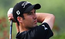 Ross Fisher tijdens HSBC Champions